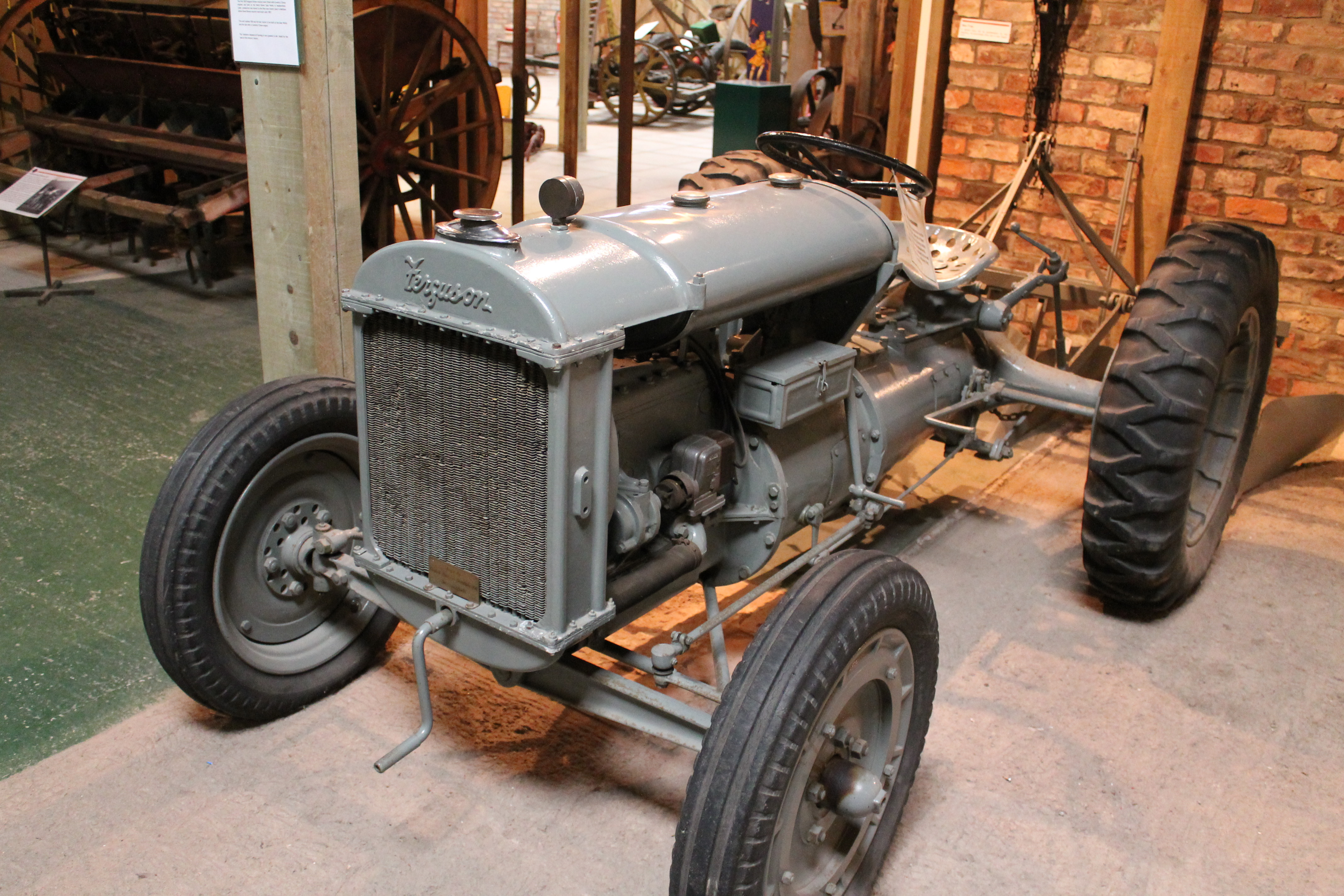 Ferguson Brown numéro de série 500 exposé au Yorkshire museum of farming.